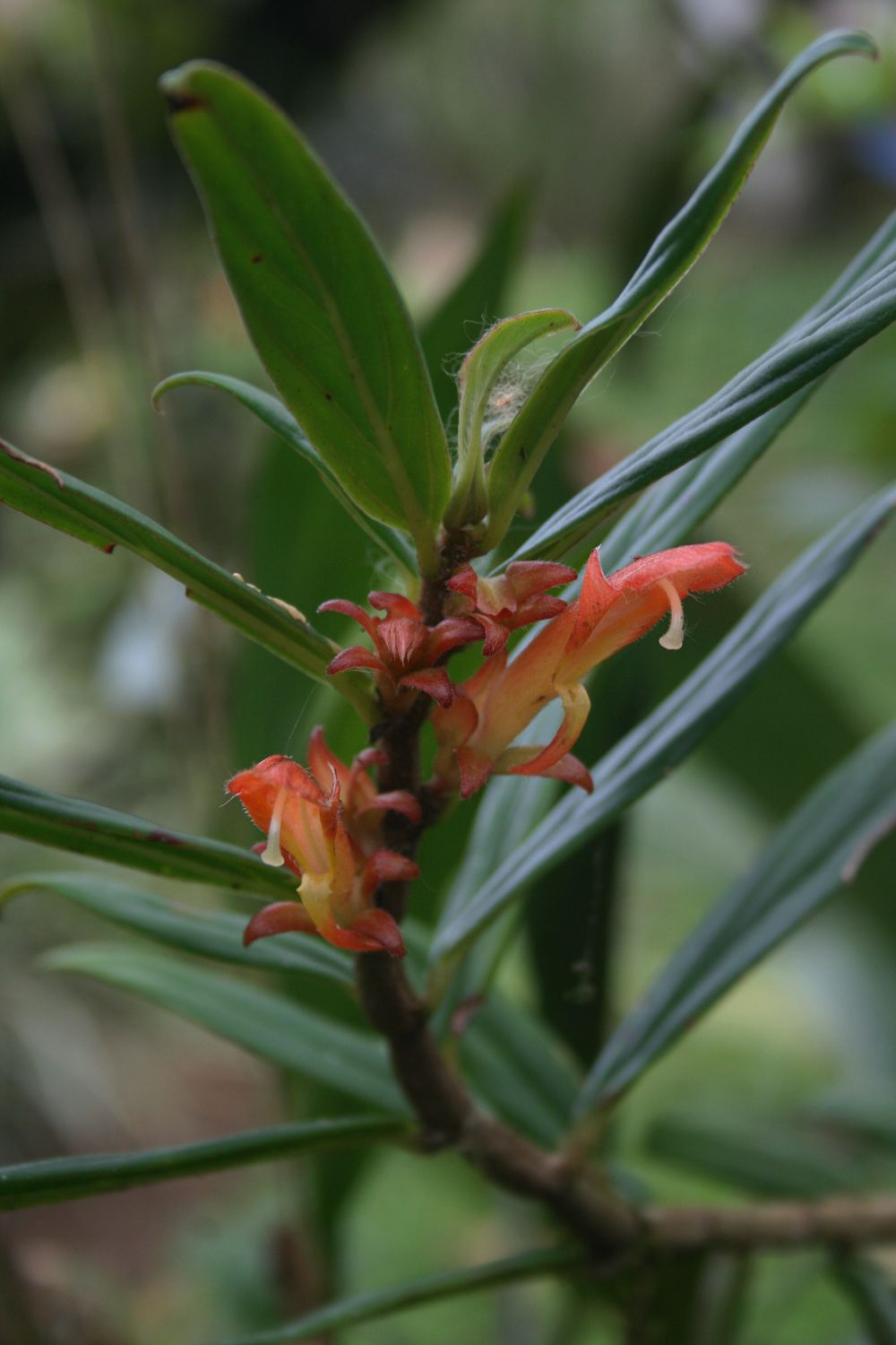 Columnea querceti, Gesneriengewächse (Gesneriaceae) - Costa Rica: Prov. Cartago, Paraíso, Jardín Botánico Lankester/Lankester Botanical Garden